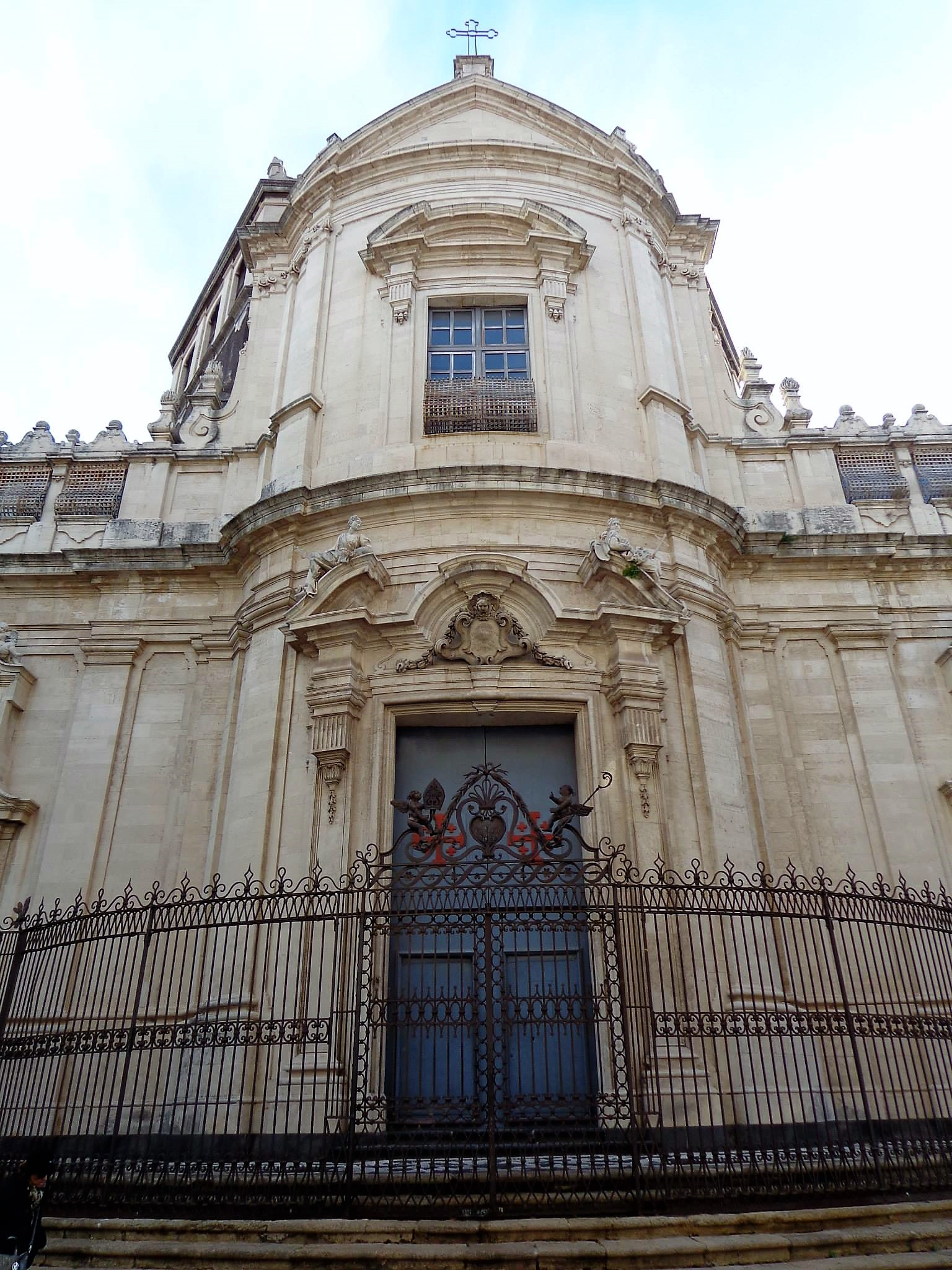 Prospetto